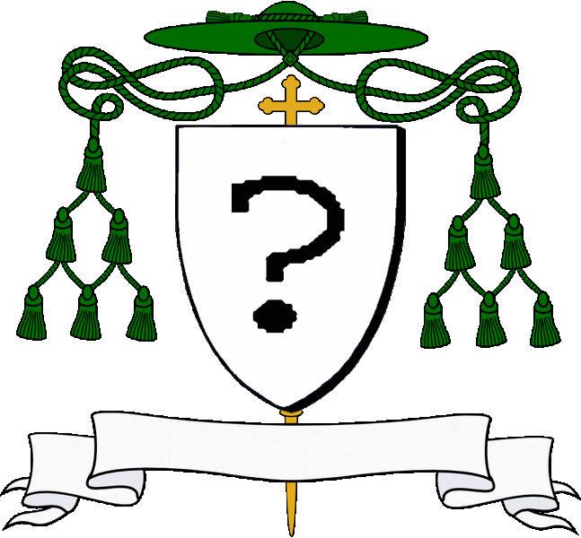 Skoed eskob goullo